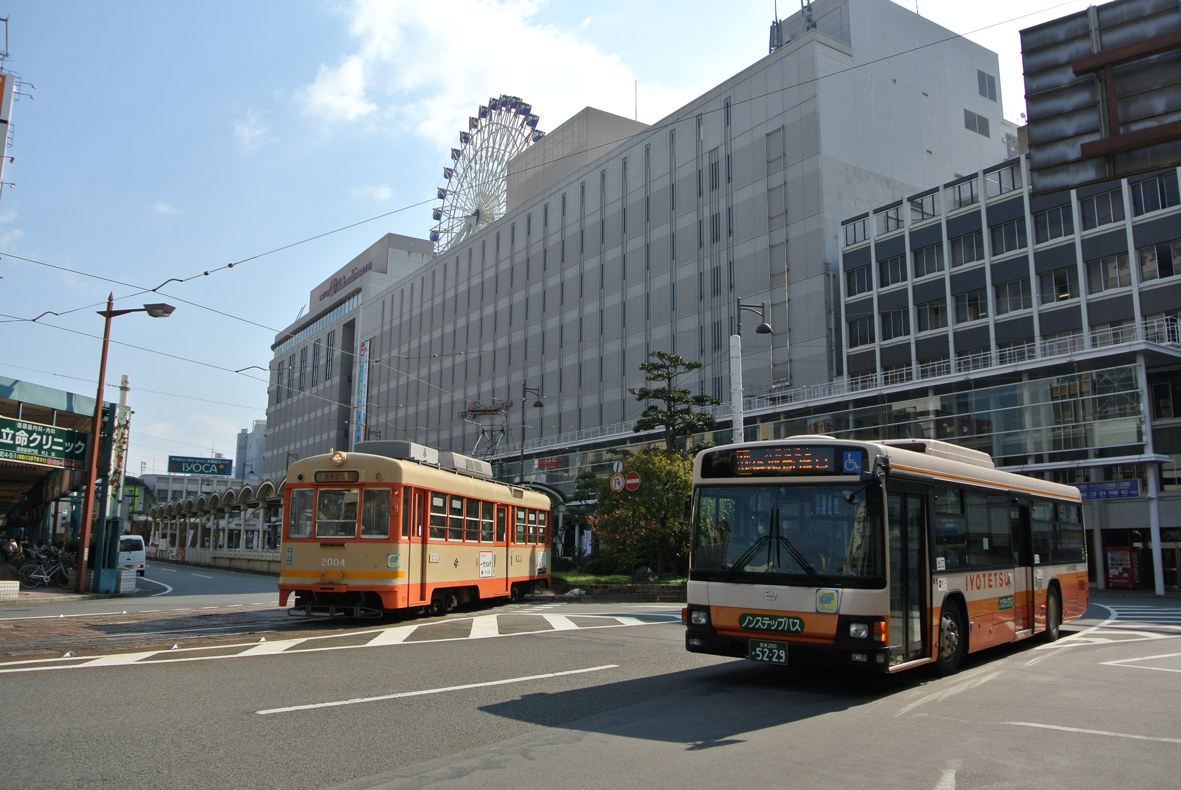 松山市駅のある伊予鉄ターミナルビル